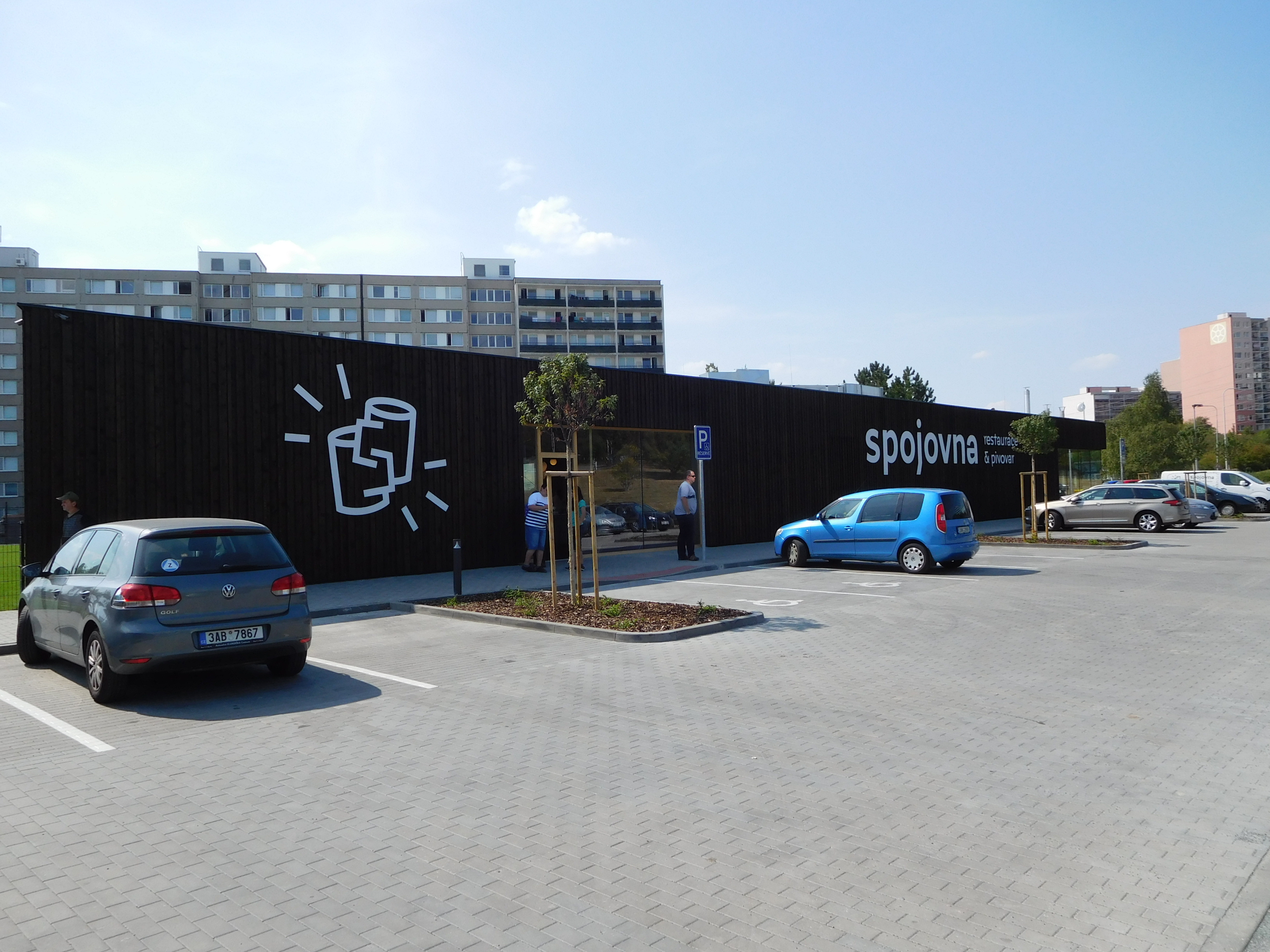 Praha - Kunratice, U Kunratického lesa 1801 - pivovar a restaurace Spojovna